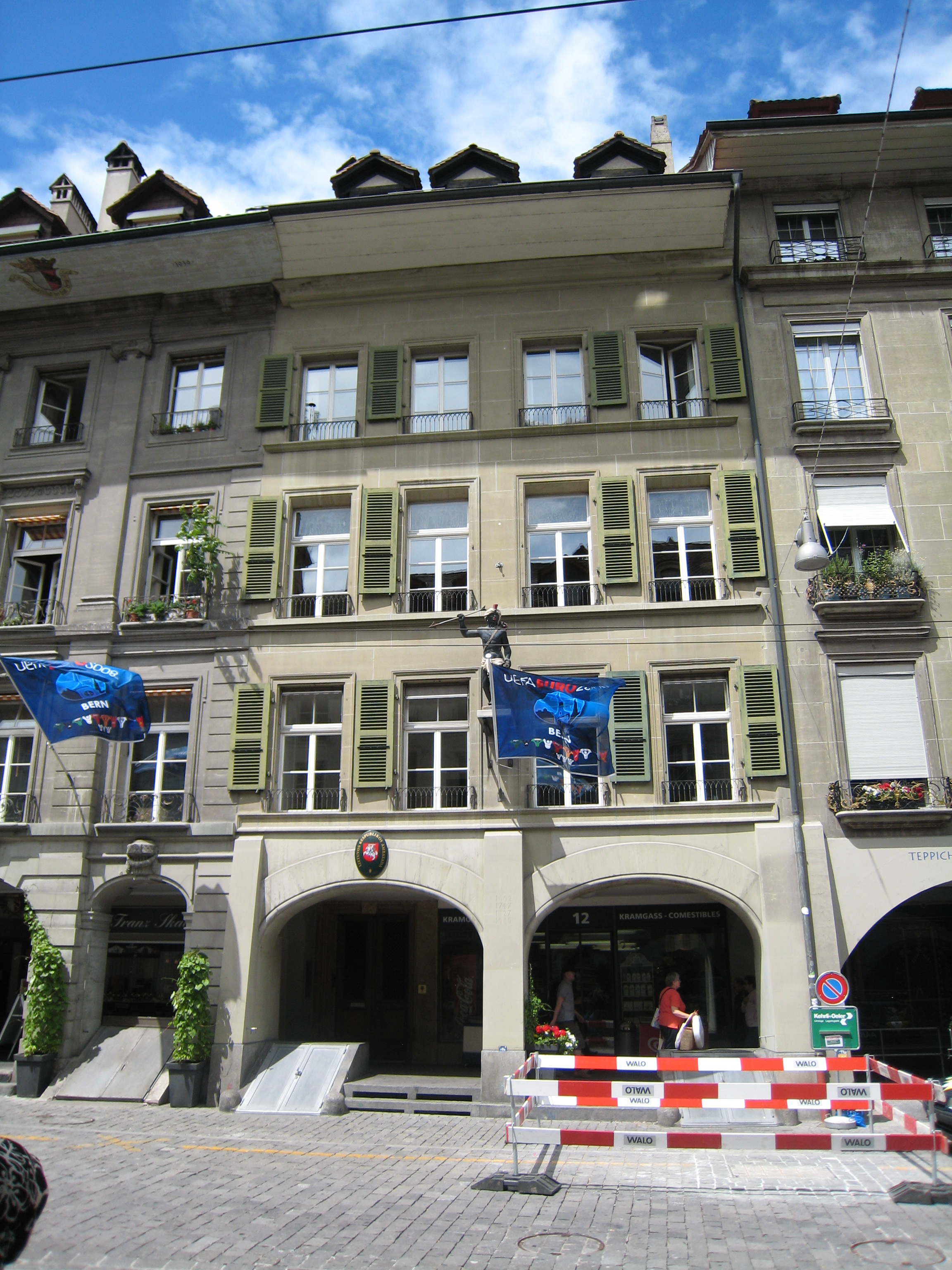 Zunfthaus zu Mohren, Kramgasse 12, Bern (Schweiz)